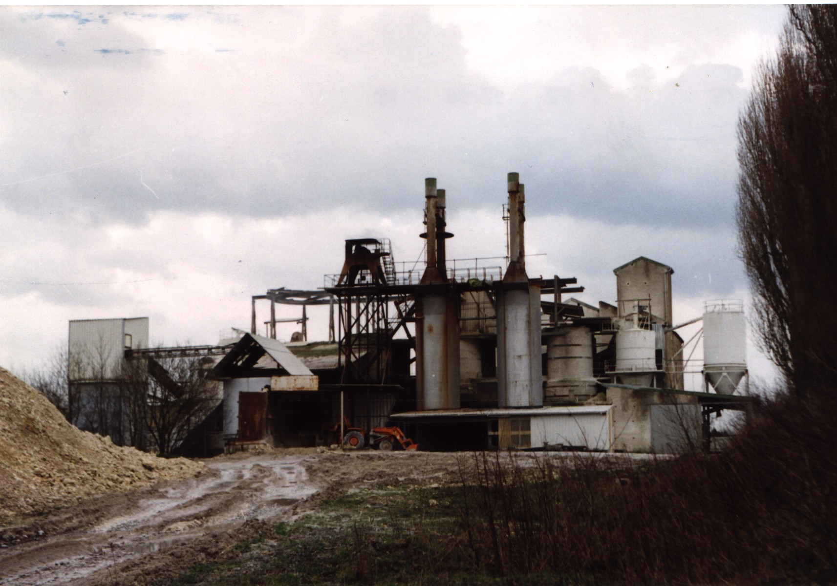 Kalkwerk Hollekamp,Nördlingen - wüllen